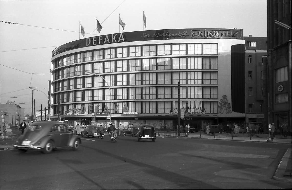 Deutsches Familienkaufhaus an der Ecke Tauentzienstraße / Rankestraße in Berlin-Charlottenburg.